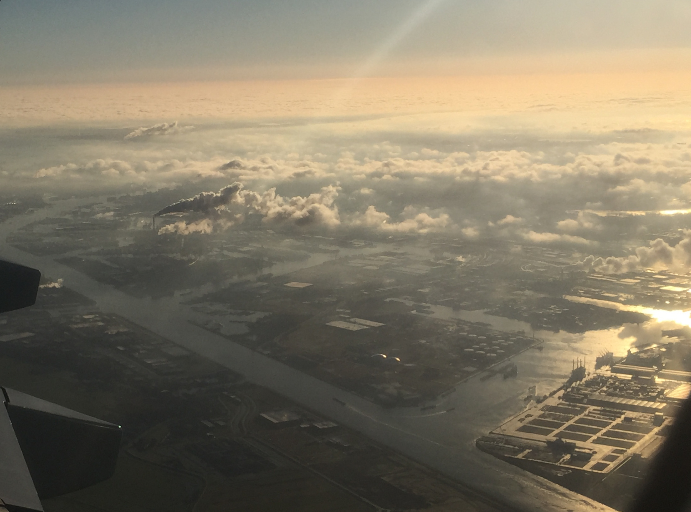 Havenswest in Amsterdam, gezien naar het zuidoosten, met rookpluikmen van de Hemwegcentrale en de Afvalverwerking West.